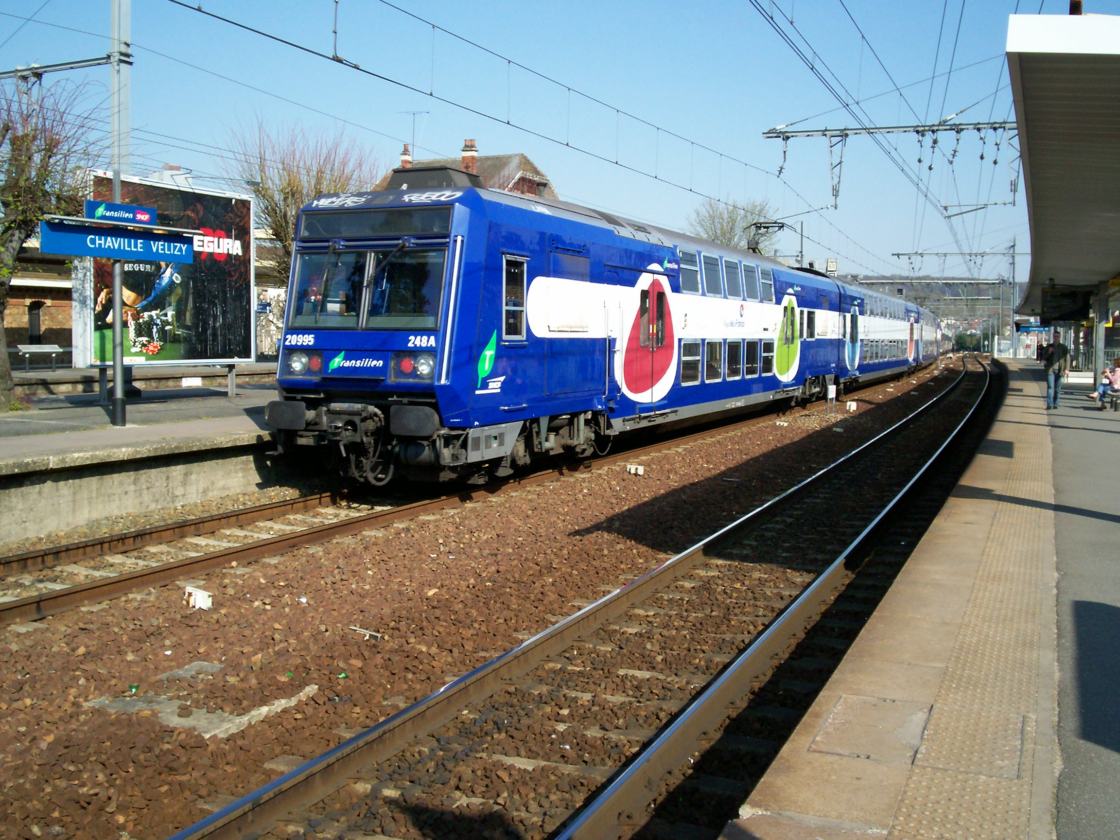 z20900 à Chaville-Vélizy